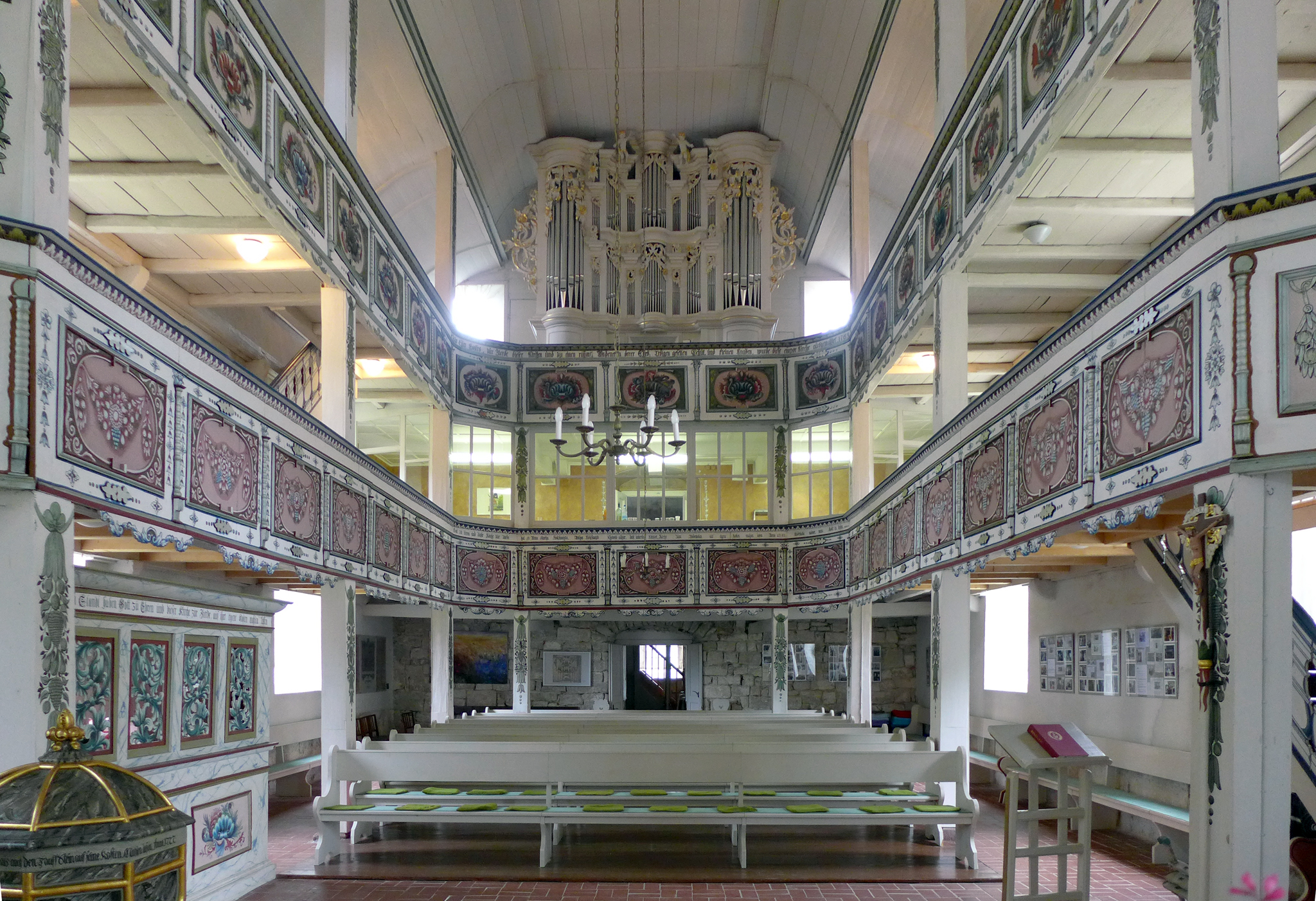 Von außen ist an der Ellichlebener Kirche - abgesehen von ihrer Größe - wenig Bemerkenswertes. Die eigentliche Sensation ist die prächtige Innenausstattung.